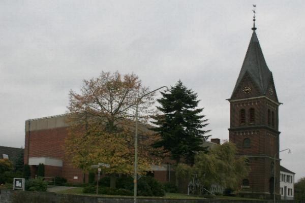 Kirchturm in Wegberg-Wildenrath